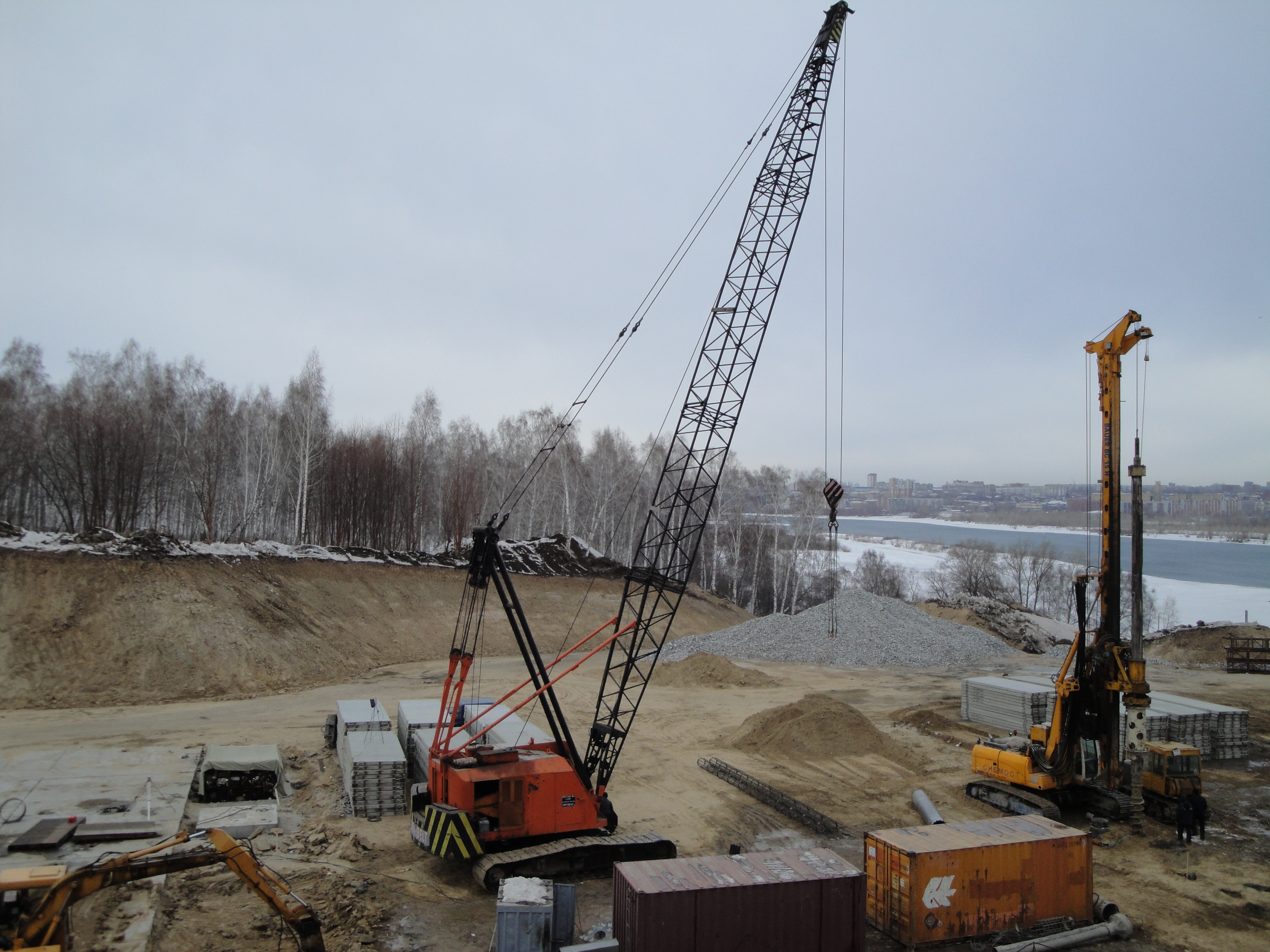 Оловозаводской мост - фундамент опоры и буровой станок